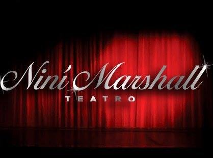 Teatro de la zona norte, Tigre